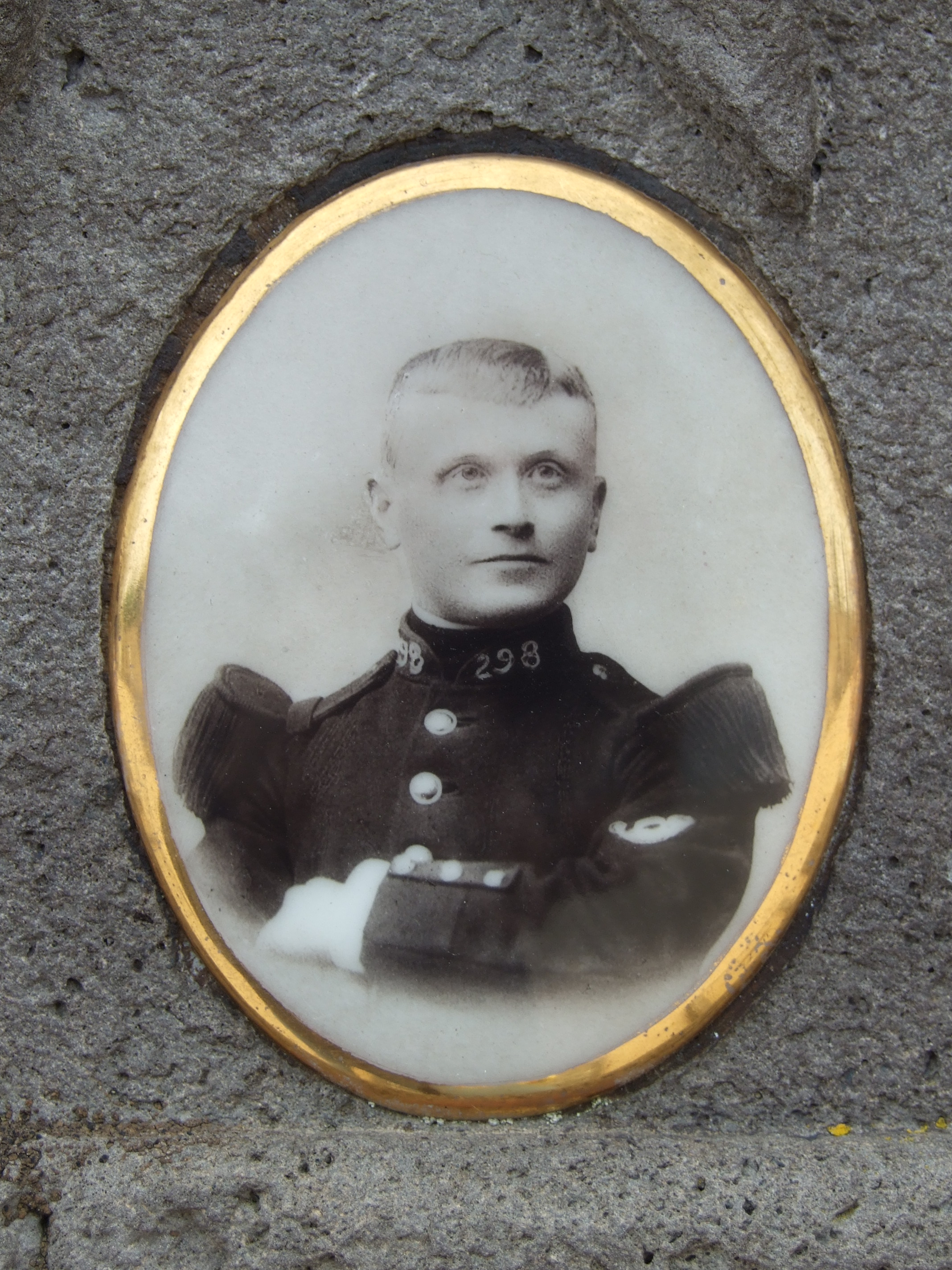 Photo de Jean Quinault, Martyr de Vingré